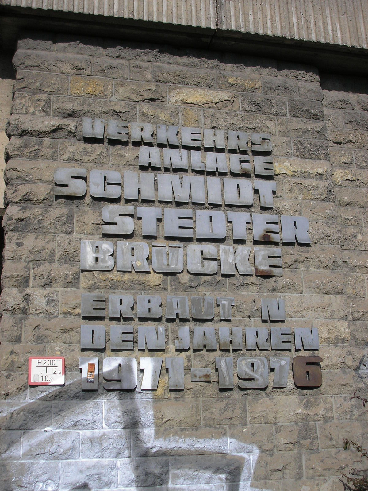 Inschrift der Schmidtstedter Brücke in Erfurt (Thüringen).